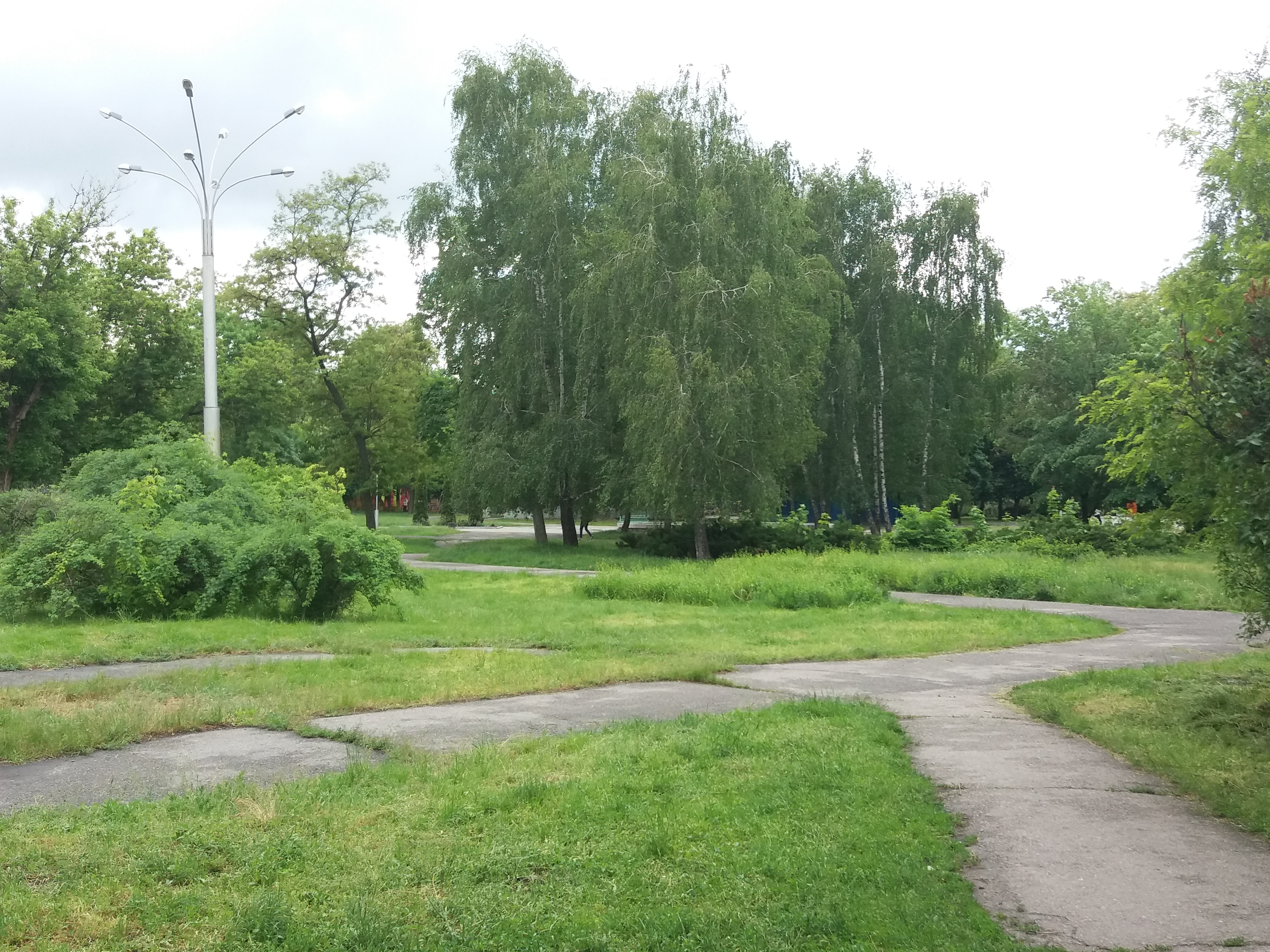 Придніпровський, м. Кременчук, набережна Дніпра. Штабний сквер – частина Придніпровського парку.